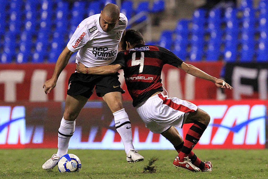 Fenômeno e Angelim Flamengo 1 x 1 Corinthians Brasileirão 2010 - Engenhão